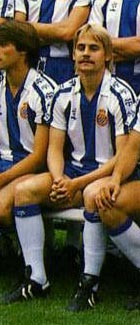 John Lauridsen